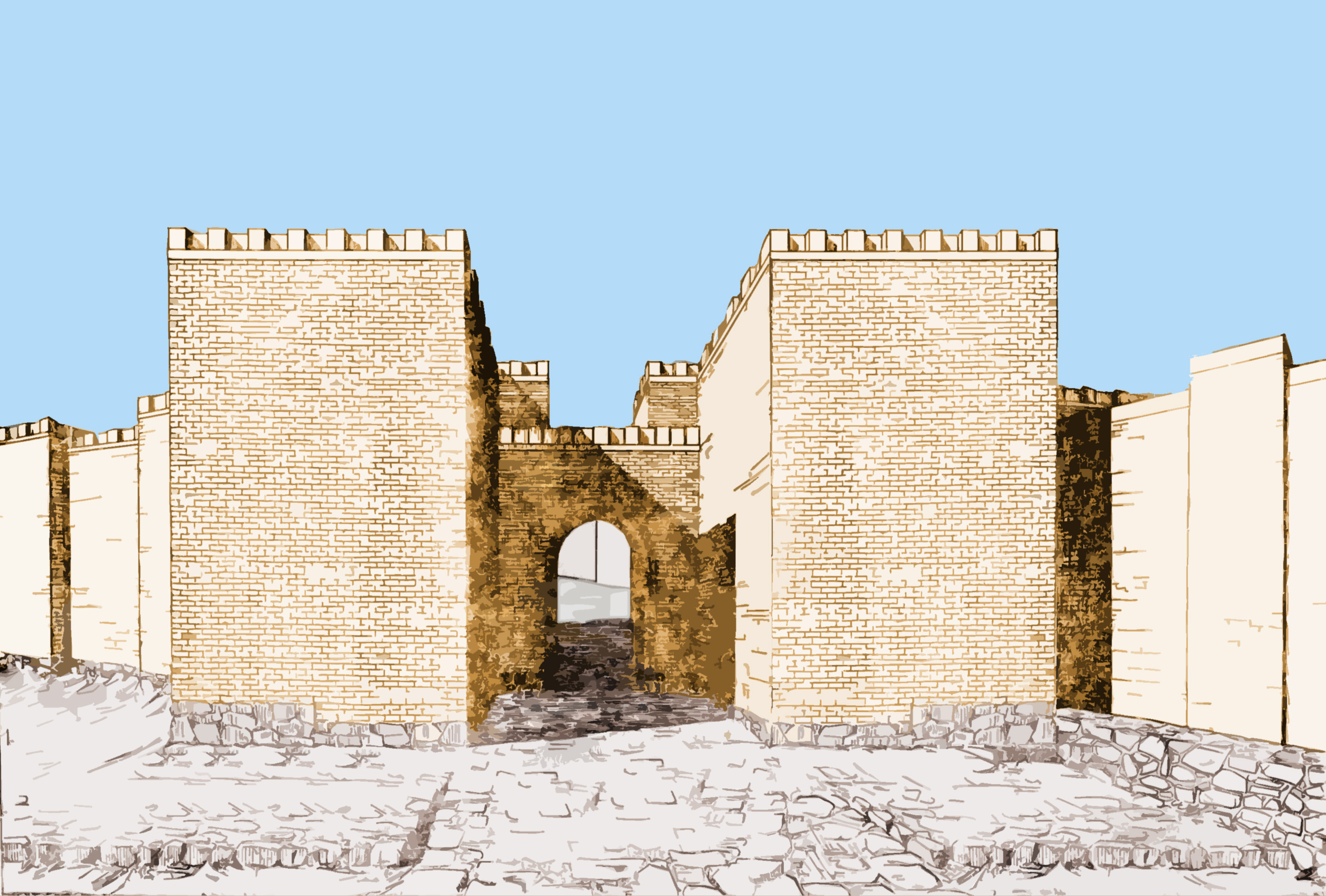 Own work based on the reconstruction of Teishebaini fortress perfomed by Oganesyan K.A. in a book: Оганесян К.А. Кармир-Блур IV, Архитектура Тейшебаини, Издательство Академии наук Армянской ССР, Ереван, 1955